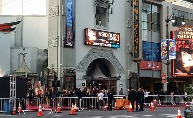 Insidious 3, Premiere in Hollywood am 4. Juni 2015